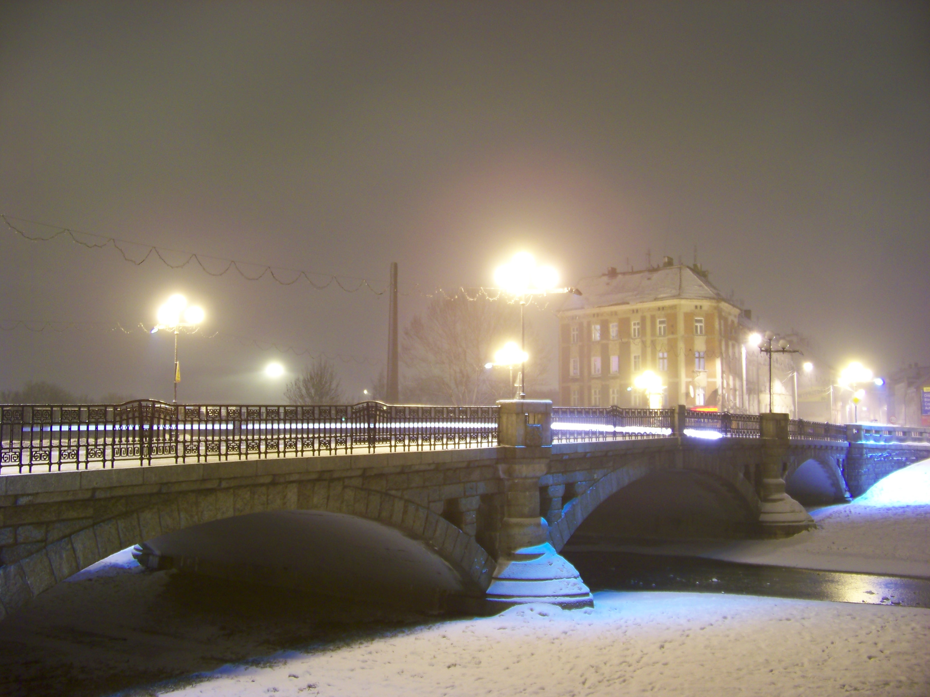 most